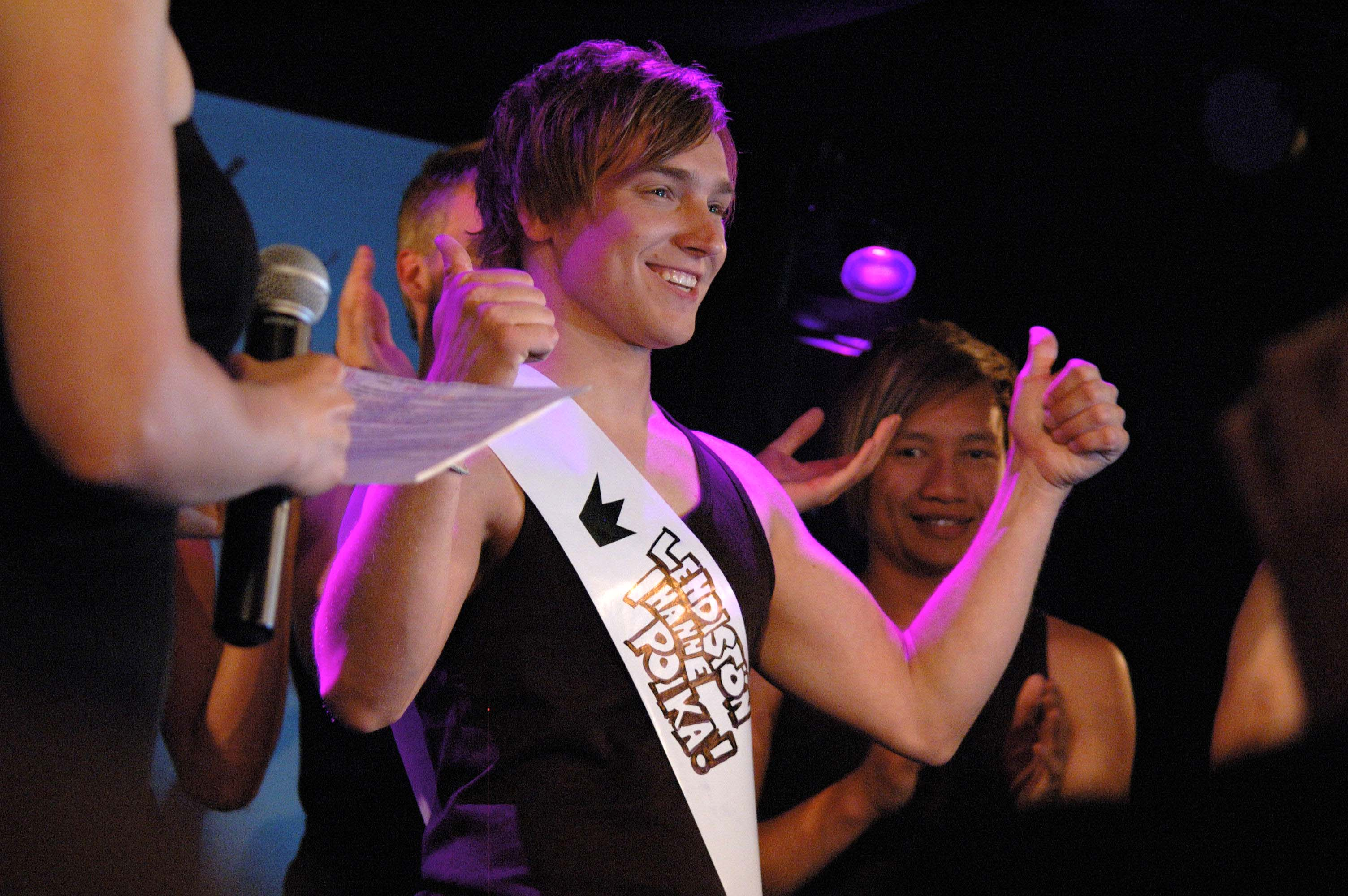 Mr. Gay Finland Kenneth Liukkonen. © Vera Saarivuori